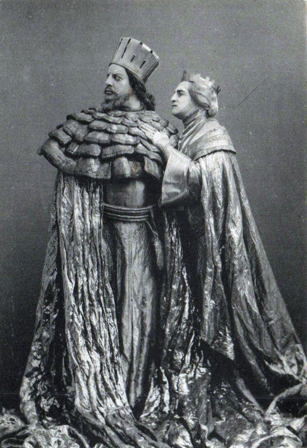 Массалитинов, Николай Осипович (роль "Клавдий") Книппер-Чехова, Ольга Леонардовна (роль "Гертруда") Спектакль "Гамлет" Московского Художественного театра